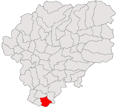 Categorie:Hărţi ale judeţului Bistriţa-Năsăud